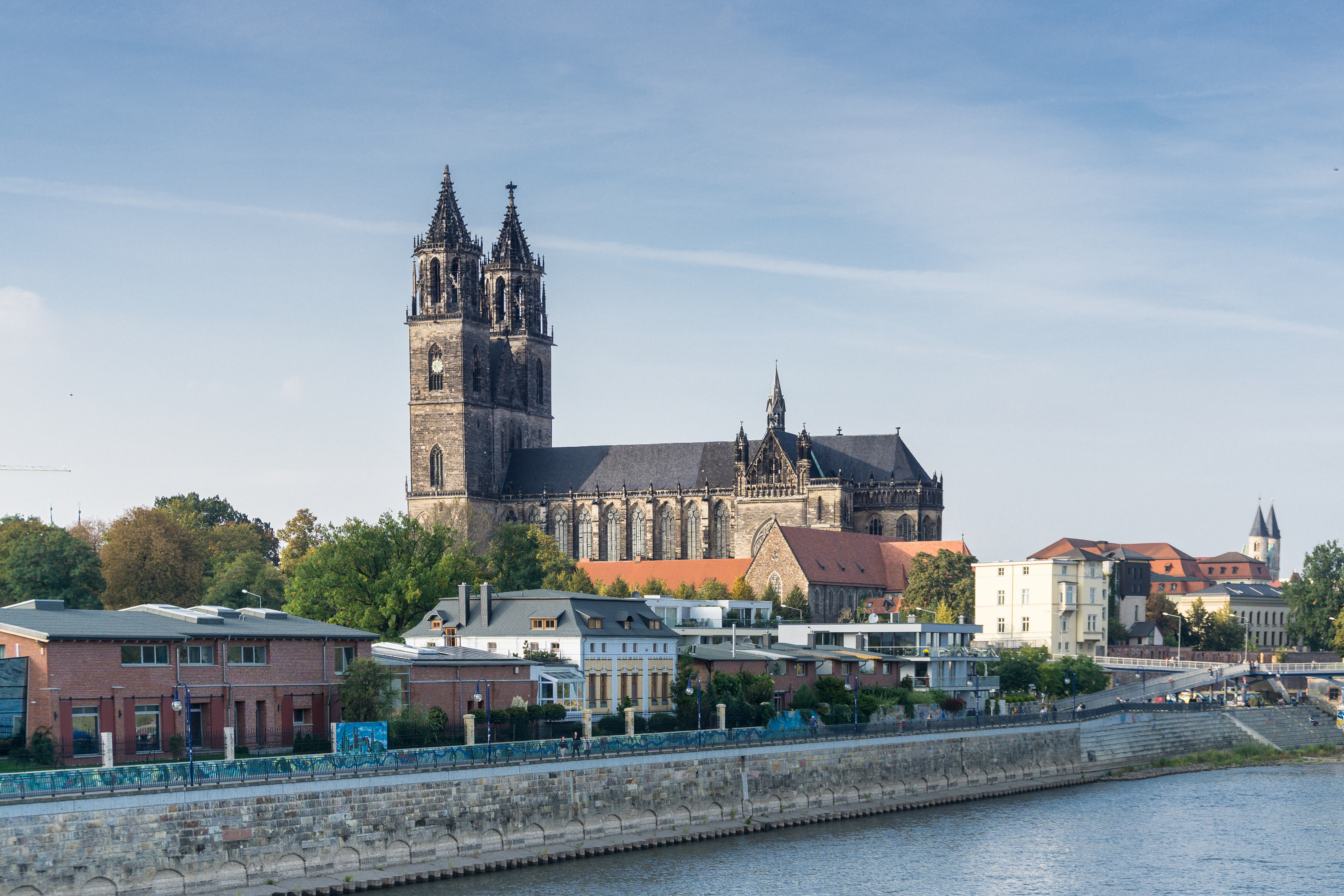 Blick von der Hubbrücke auf die Elbe und den Magdeburger Dom in Magdeburg Stt Magdeburger Altstadt